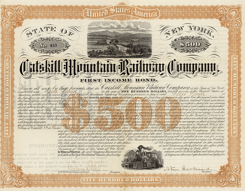 Bond of the Catskill Mountain Railway from the 2nd July 1885